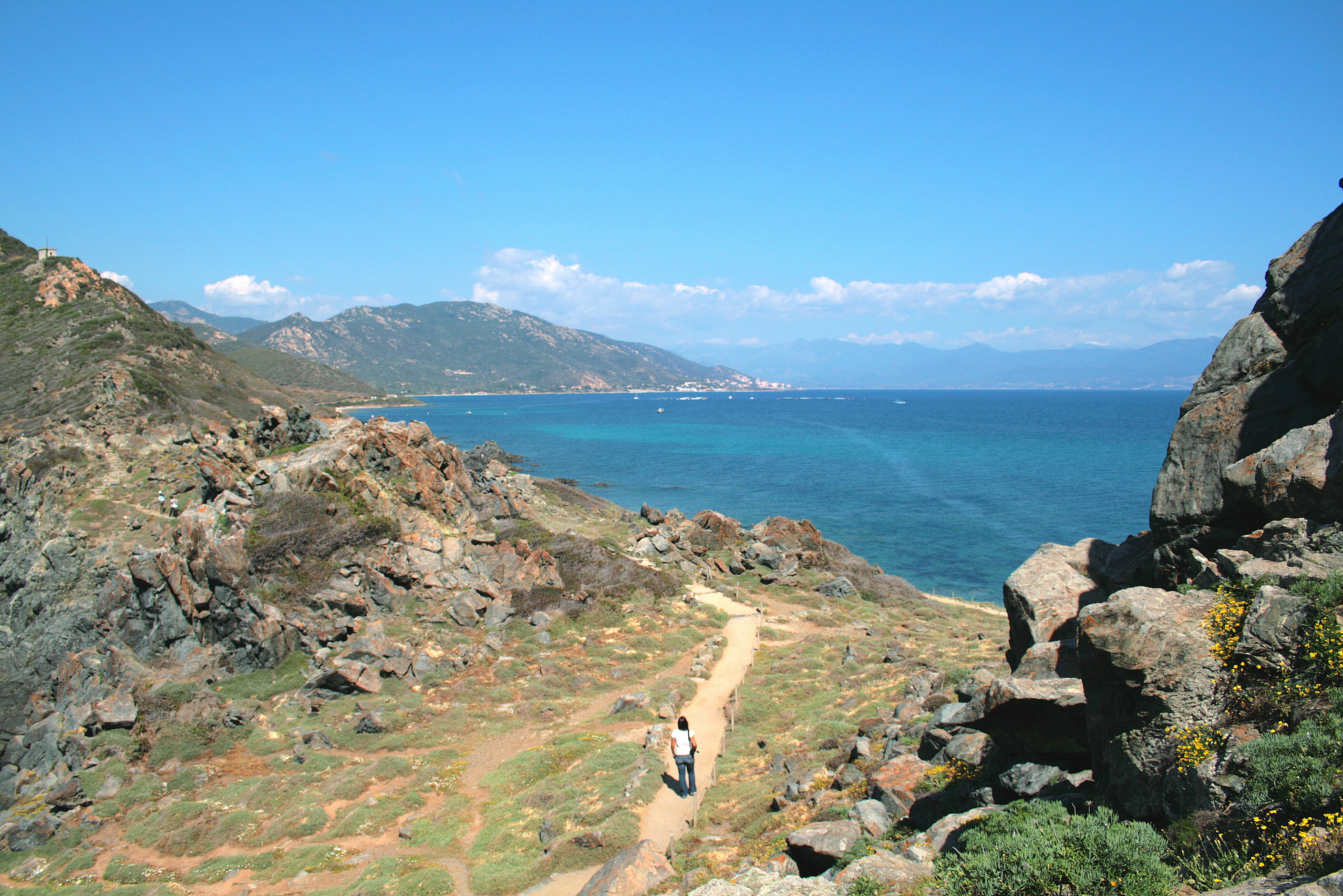 Ajaccio France, le golfe d'Ajaccio vu depuis la pointe de la Parata.